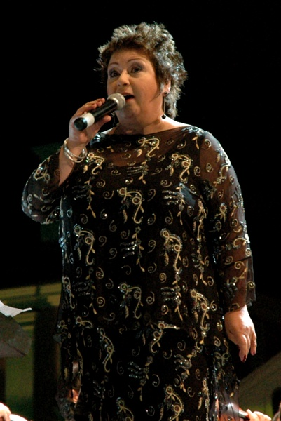 Ewa Bem